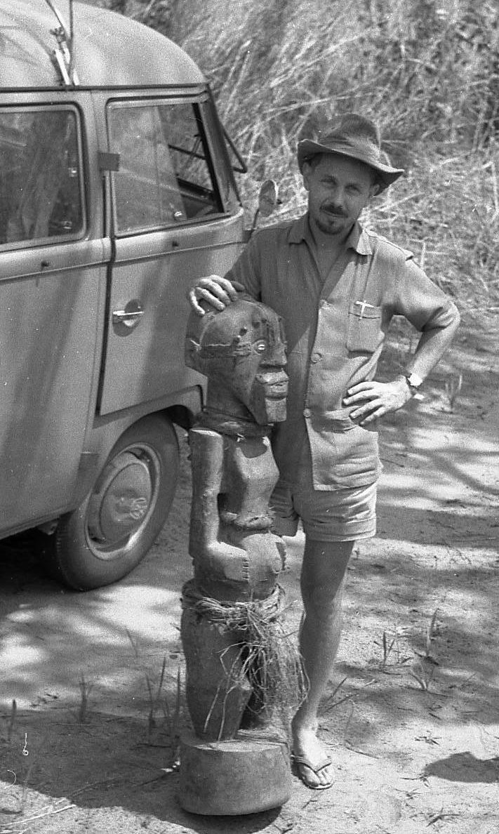 Boris Kegel-Konietzko mit einem Fetisch des Songye-Stammes, 1955 im Kassai-Gebiet